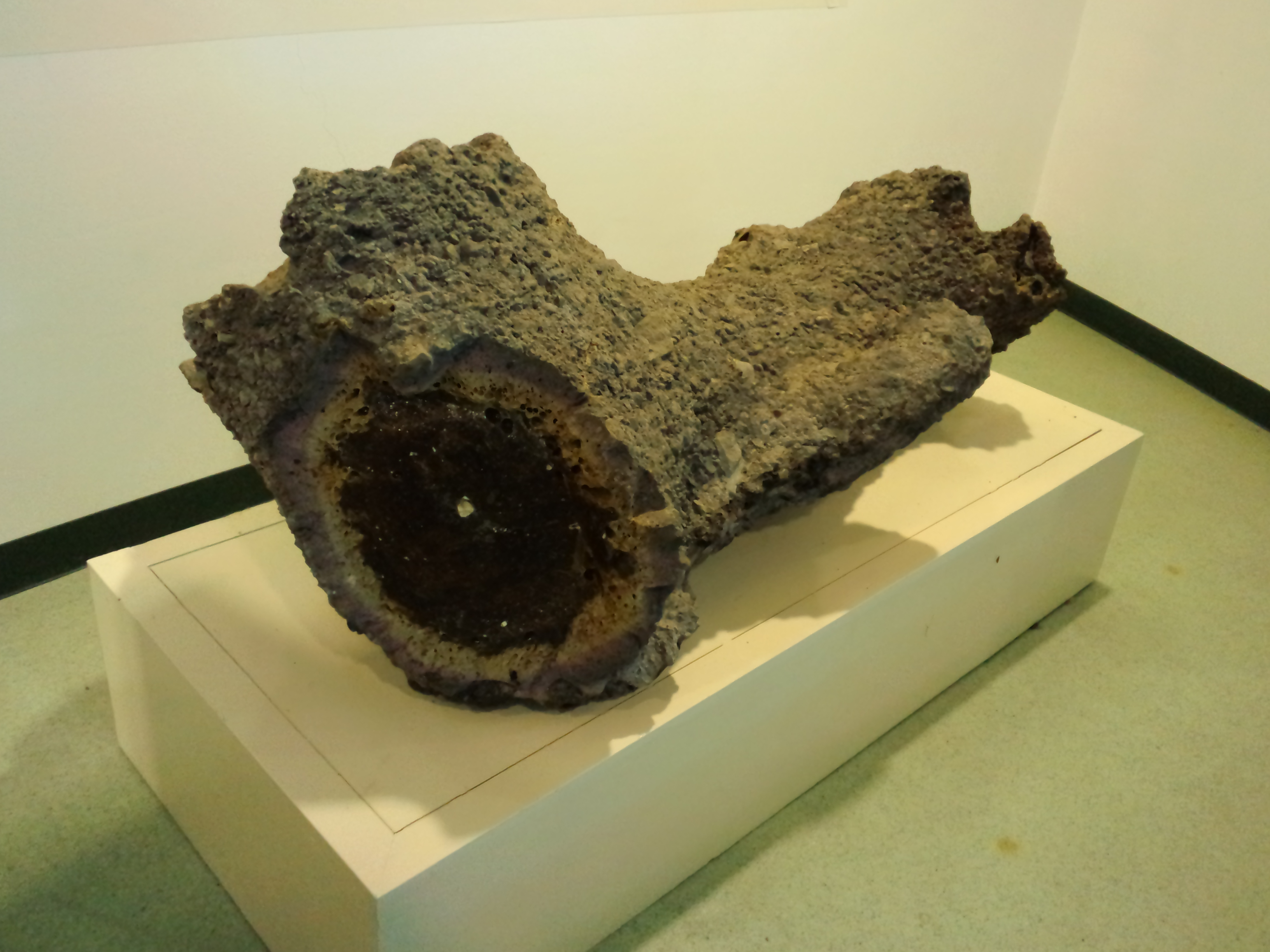 岩見沢郷土科学館で展示されている国内初・国内最大の雷管石